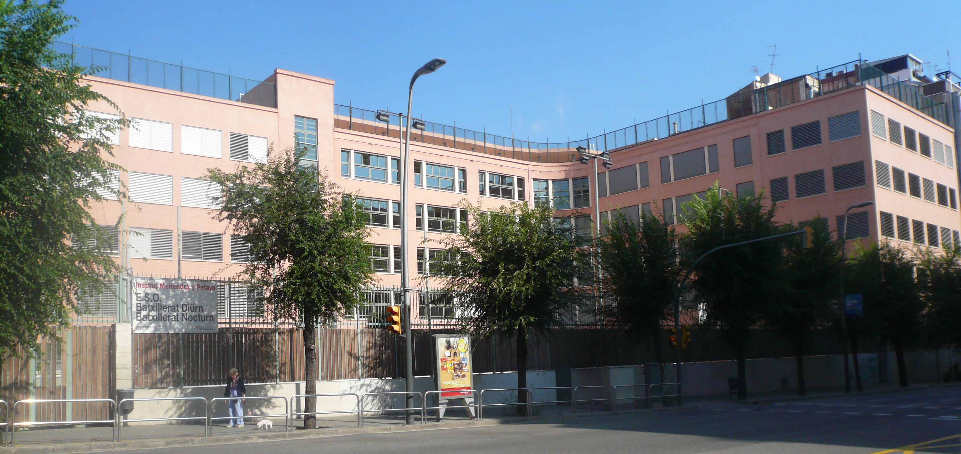 Escoles Blanquerna, actual IES Menéndez y Pelayo (Barcelona)